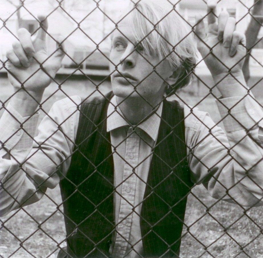 Aarni Varjonen